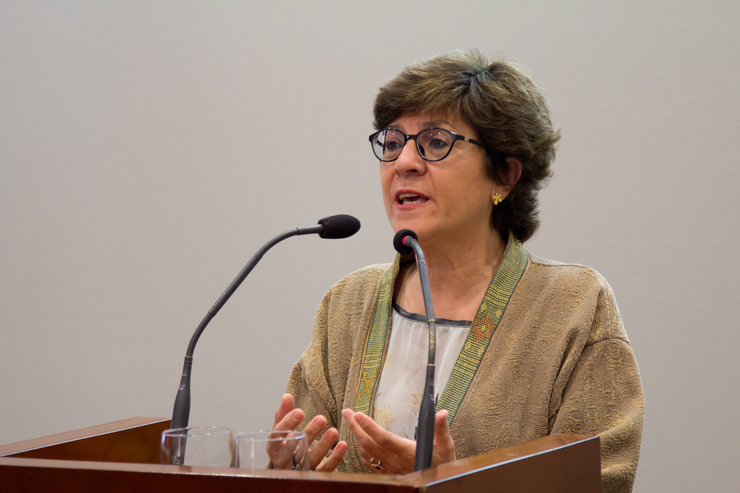 Capitolina Díaz, presidenta de la Asociación de Mujeres Investigadoras y Tecnólogas, en el editatón por la visibilidad de las científicas en Wikipedia 2015, Residencia de Estudiantes, Madrid, España.